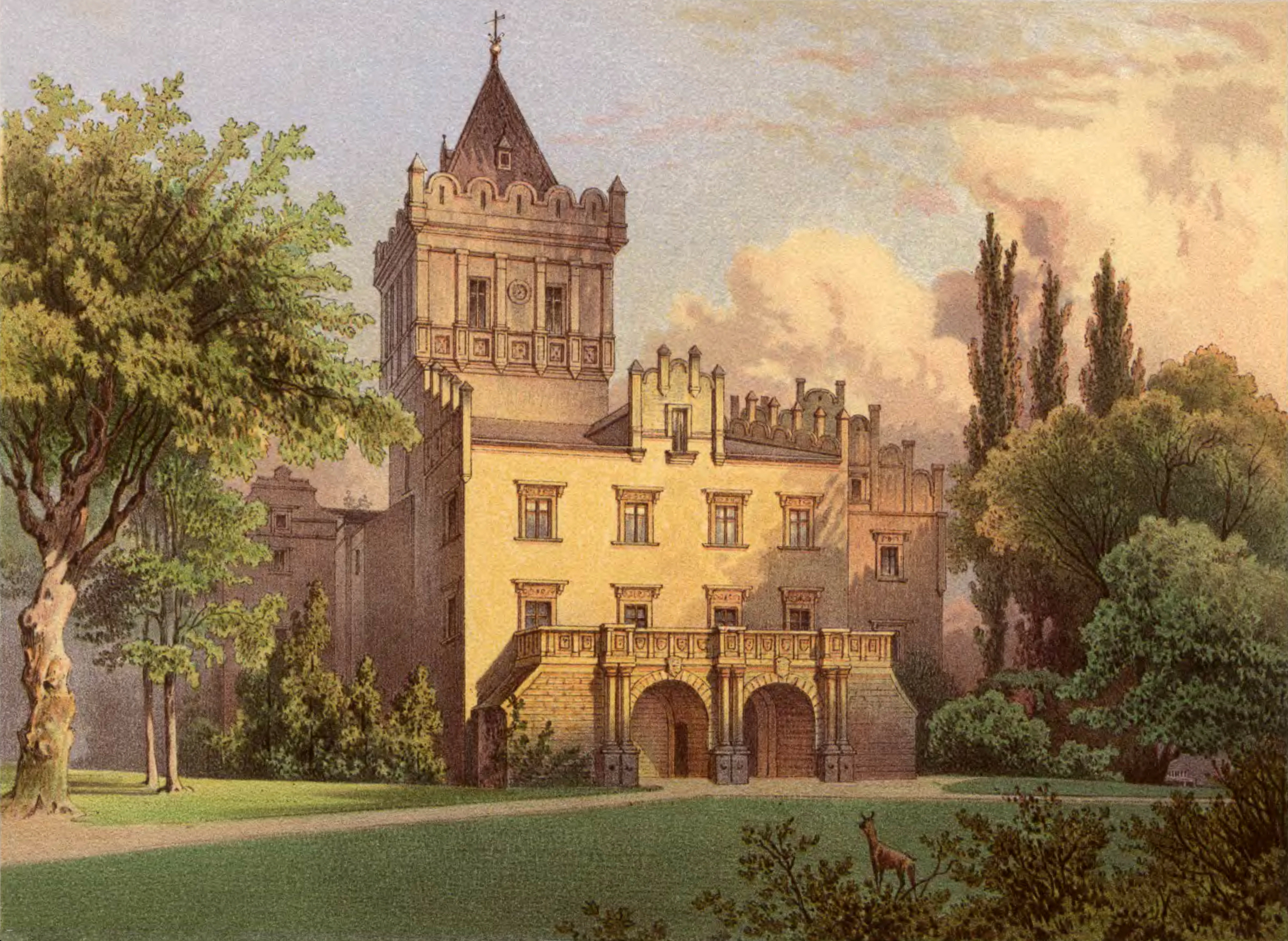 Schloss Kreppelhof wurde vermutlich Anfang des 16. Jahrhunderts im Renaissancestil errichtet. Es lag im Norden der Stadt Landeshut am linken Ufer des Bober und wurde 1566 sowie 1588 ausgebaut. Es war Sitz der gleichnamigen Herrschaft und Anfang des 16. Jahrhunderts im Besitz des Hans von Dyhrn. Mitte des 18. Jahrhunderts waren Schloss und Herrschaft im Besitz des Erdmann II. Graf von Promnitz. Er schenkte Kreppelhof am 8. Juni 1765 seinem Neffen Christian Friedrich Graf zu Stolberg-Wernigerode, der sie seinem Sohn Anton zu Stolberg-Wernigerode vererbte. Nach dessen Tod 1854 gelangte Kreppelhof an seinen Sohn Eberhard zu Stolberg-Wernigerode, dem sein Neffe Udo zu Stolberg-Wernigerode folgte. Dessen Sohn Albrecht Graf zu Stolberg-Wernigerode wurde 1945 enteignet und vertrieben. 1964 brannte Schloss Kreppelhof aus.